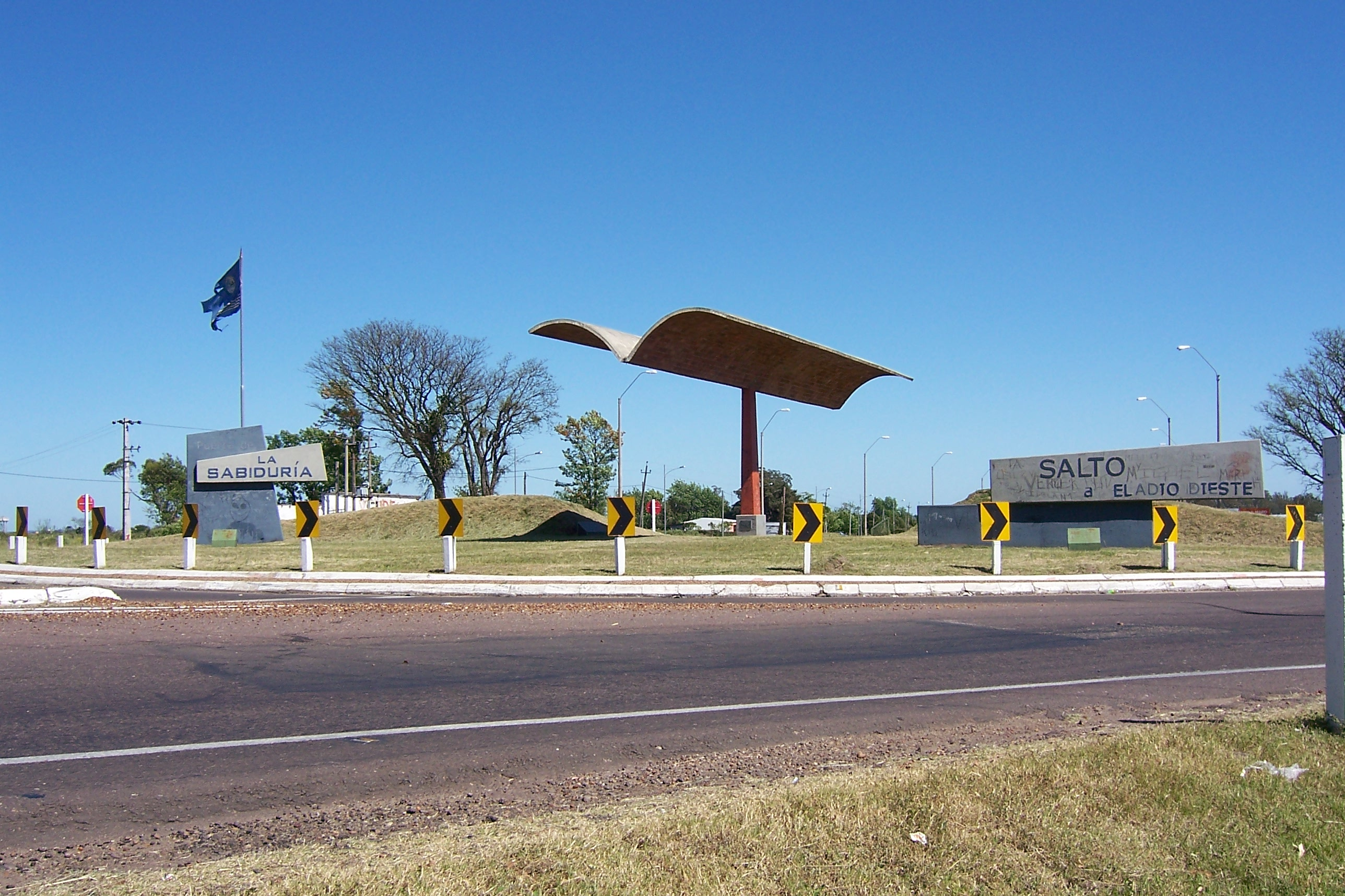 Homenaje de la ciudad uruguaya de Salto al ingeniero Eladio Dieste, monumento denominado Puerta de la sabiduría y conocido por los lugareños como "La gaviota".